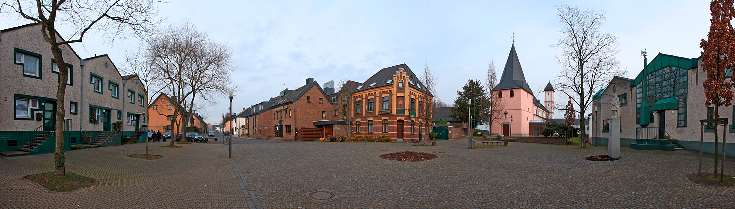 Köln-Rheinkassel Dorfplatz, Mitte St.-Amandus-Kirche, rechts und Links Teile der Amandus-Siedlung von Gottfried Böhm